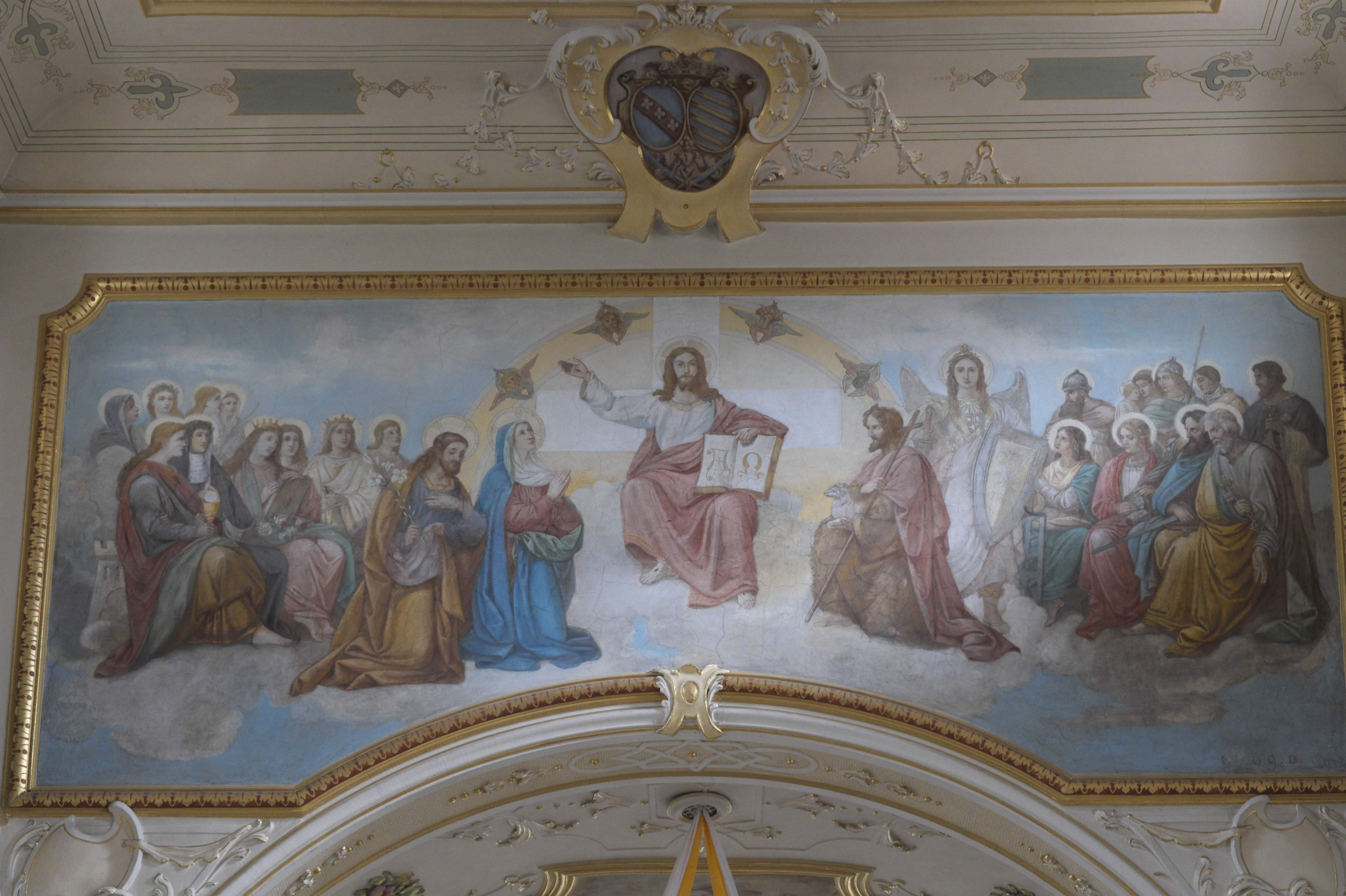 Katholische Pfarrkirche St. Benedikt in Odelzhausen im Landkreis Dachau (Bayern/Deutschland), Gemälde über dem Chorbogen; Darstellung: Jesus, Maria und Joseph, Johannes der Täufer, Heilige